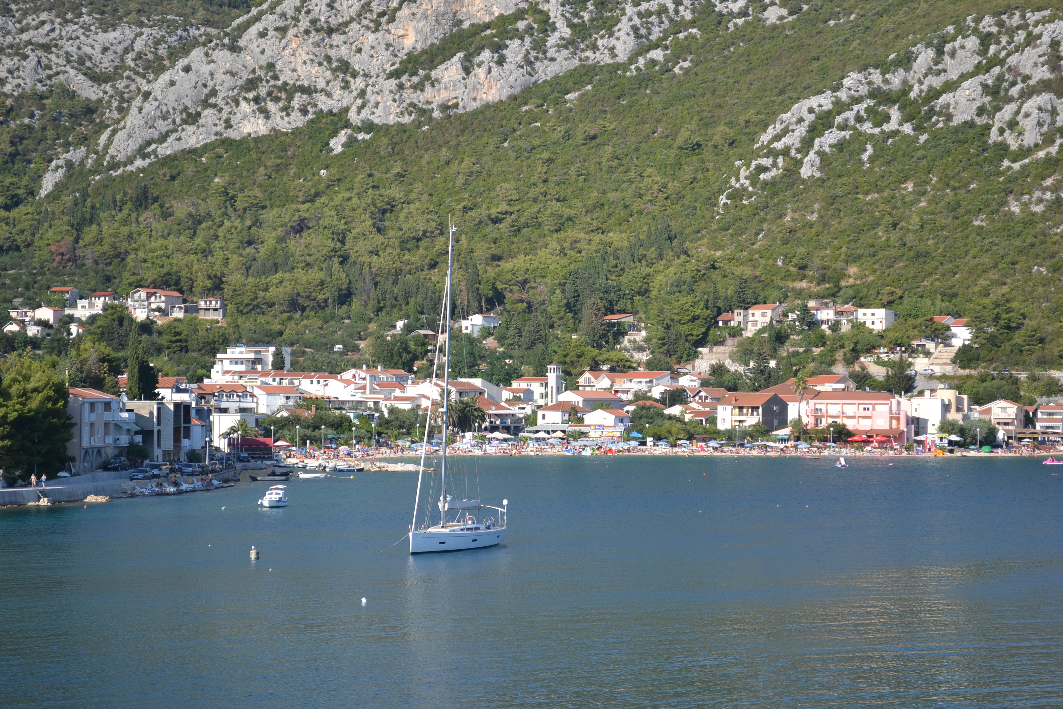 Клек, хрватско приморје, општина Сливно